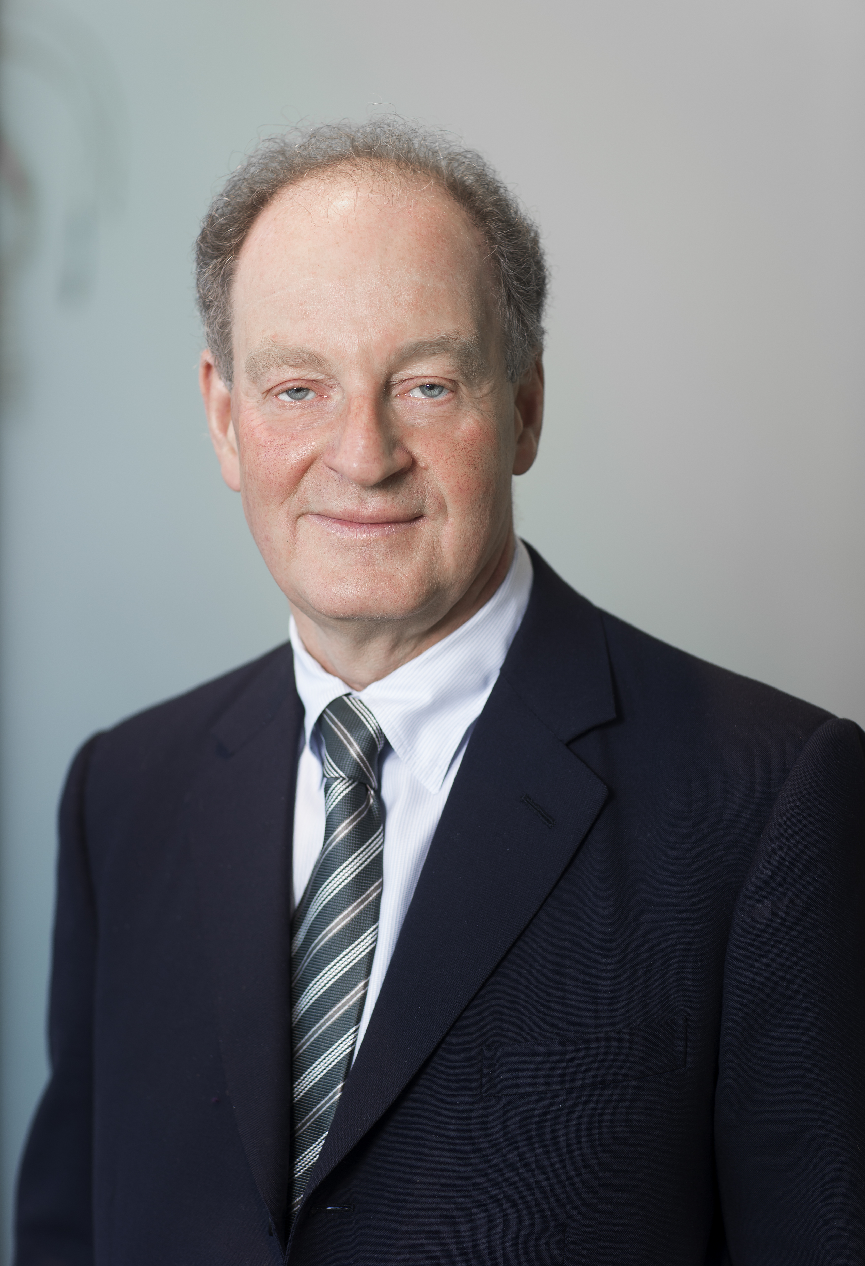 Affärsmannen och delägaren i Bonnierkoncernen, Pontus Bonnier.